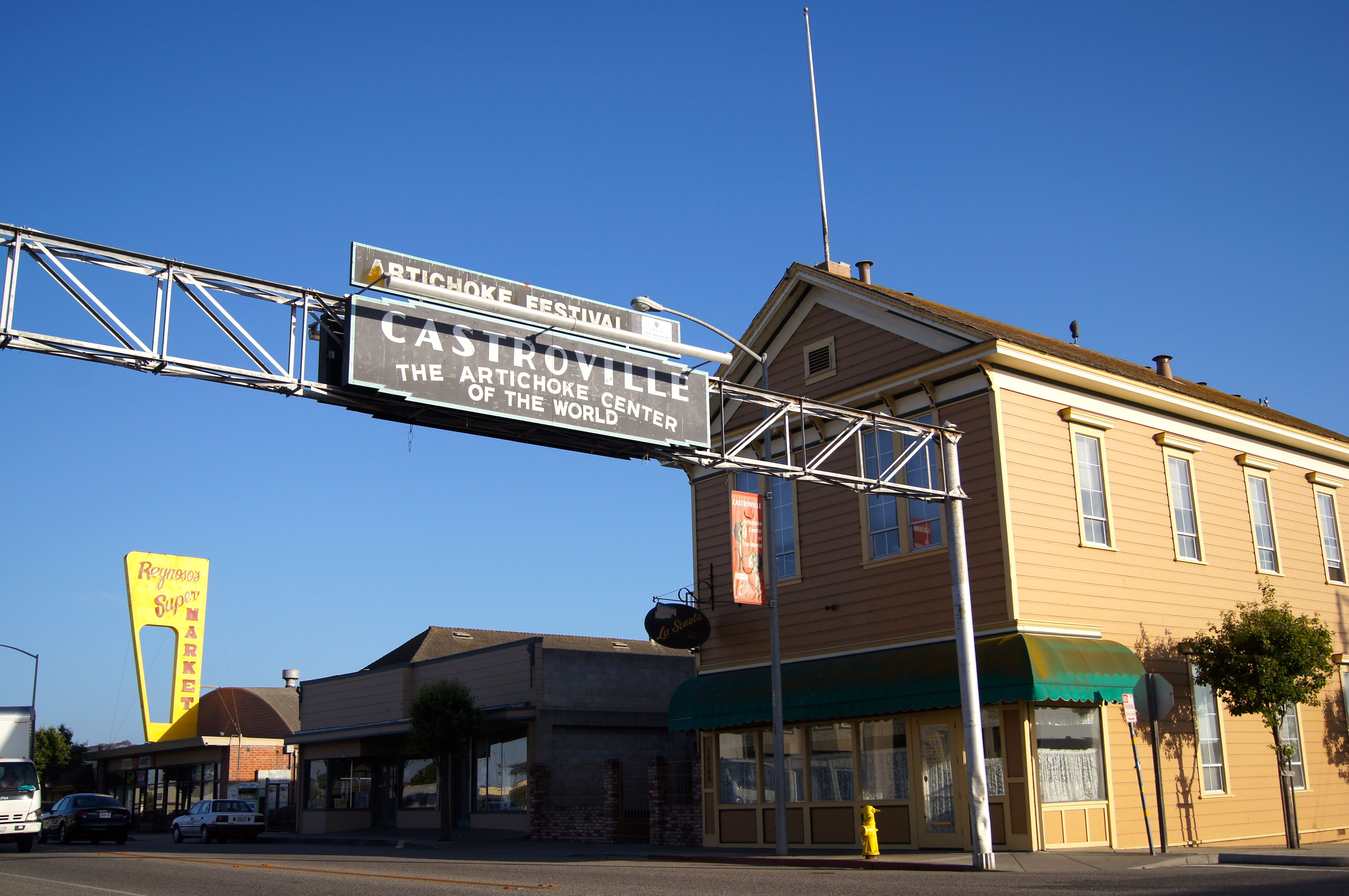 La Scuola